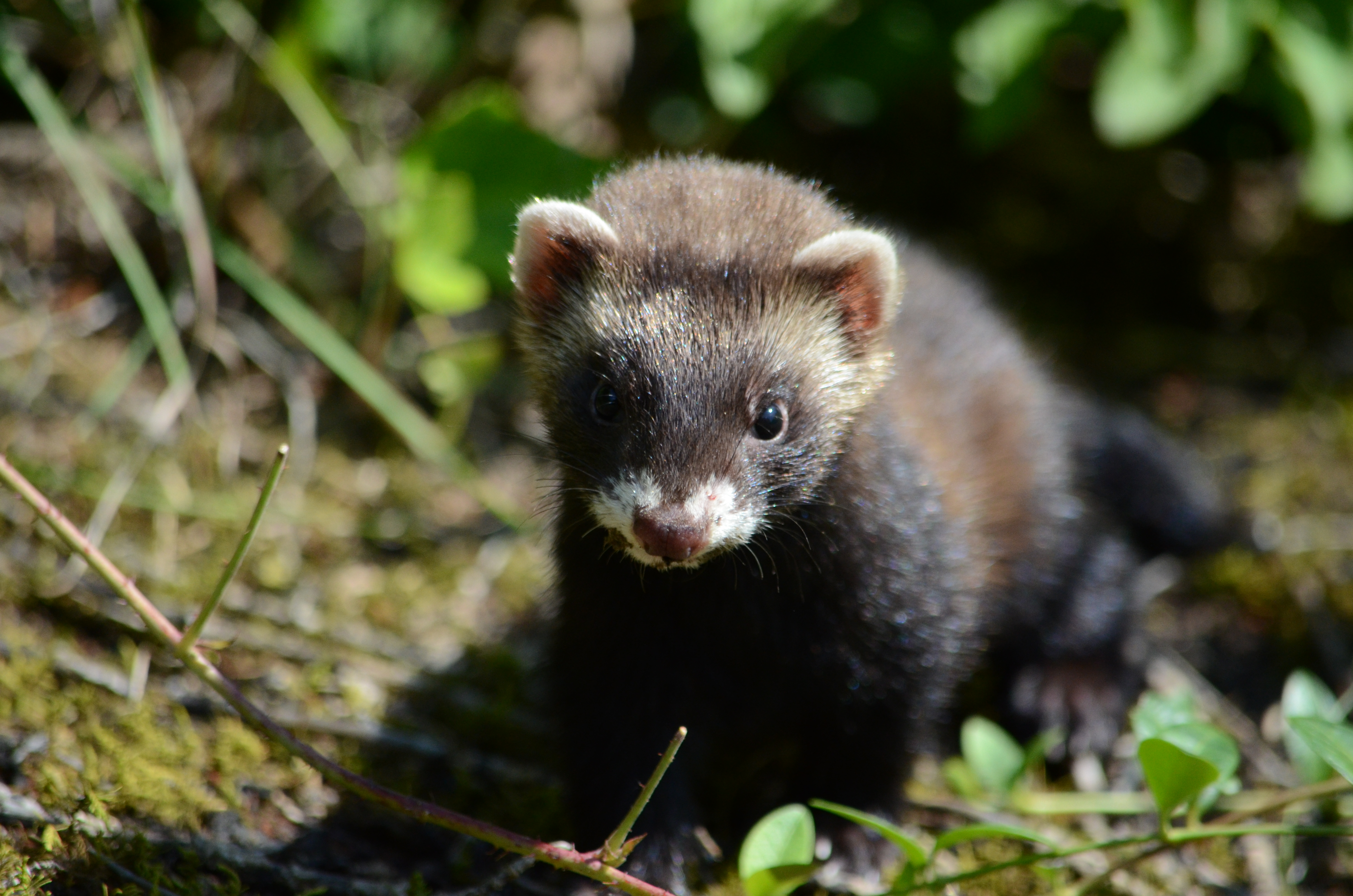 junger Iltis am Wiener Zentralfriedhof